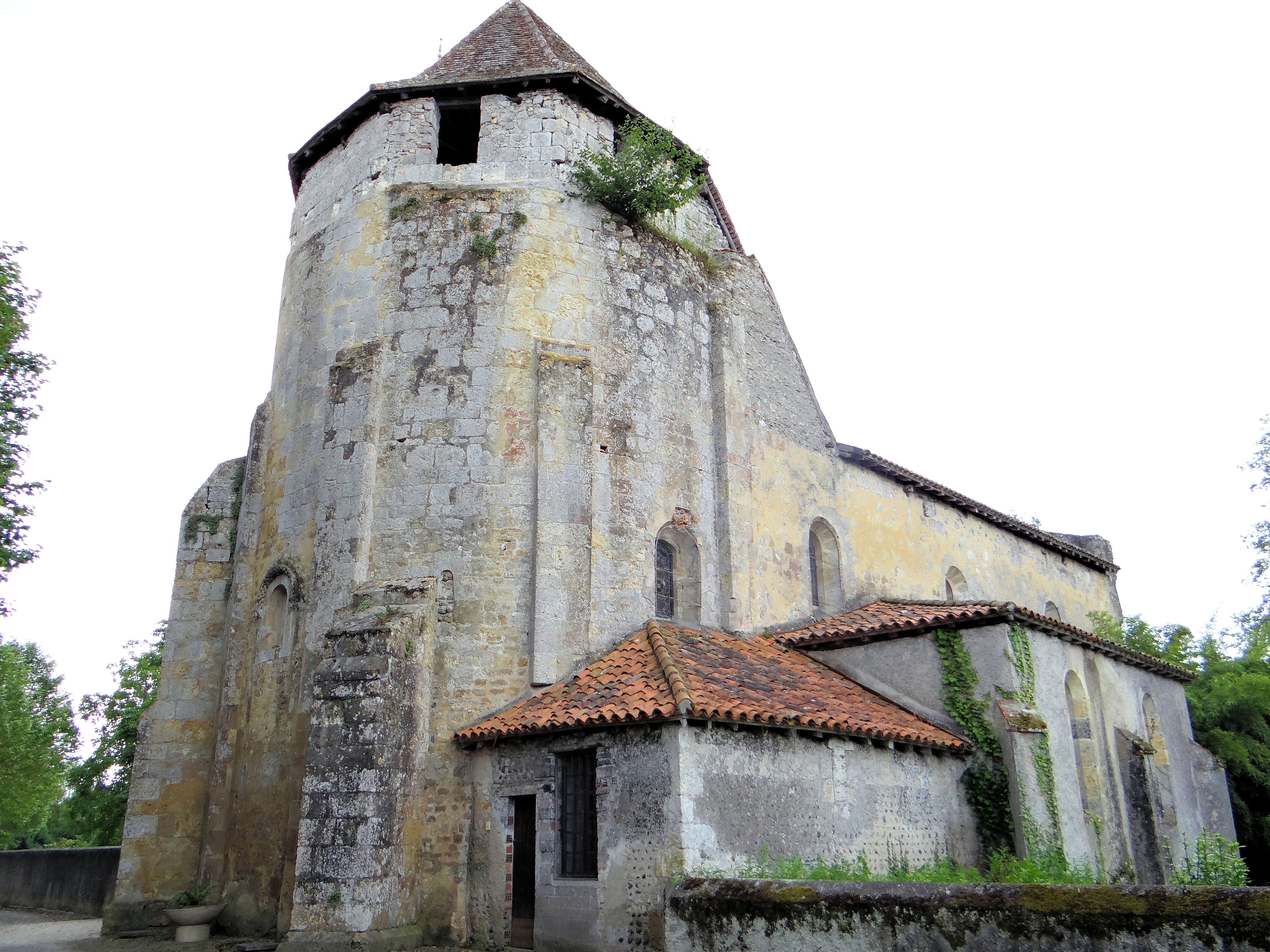 Préchac-sur-Adour - Église Saint-Jean-Baptiste - Chevet